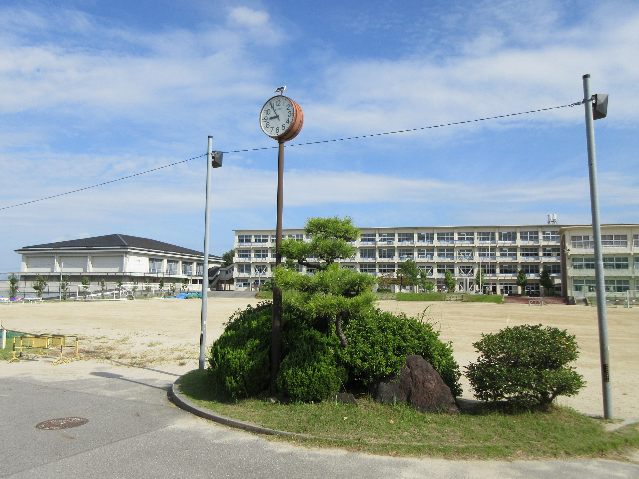 岡崎市立竜海中学校（岡崎市明大寺町）